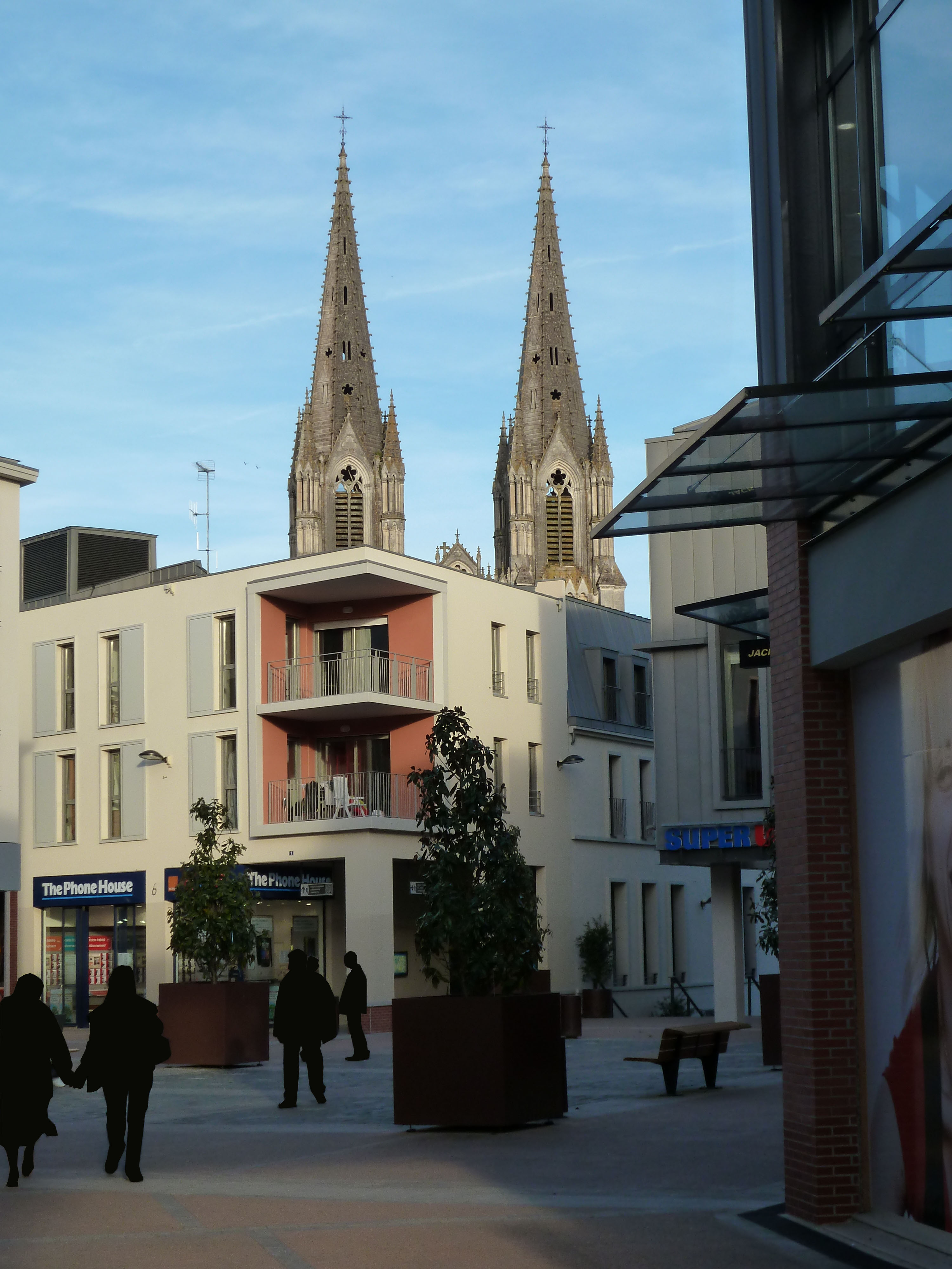 Zone commerciale Arcades Rougés avec Eglise en arrière plan